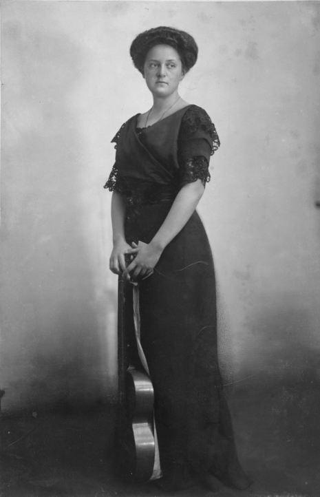 Eleonore Maria Immakulata Erzherzogin von Österreich (1886 - 1974).